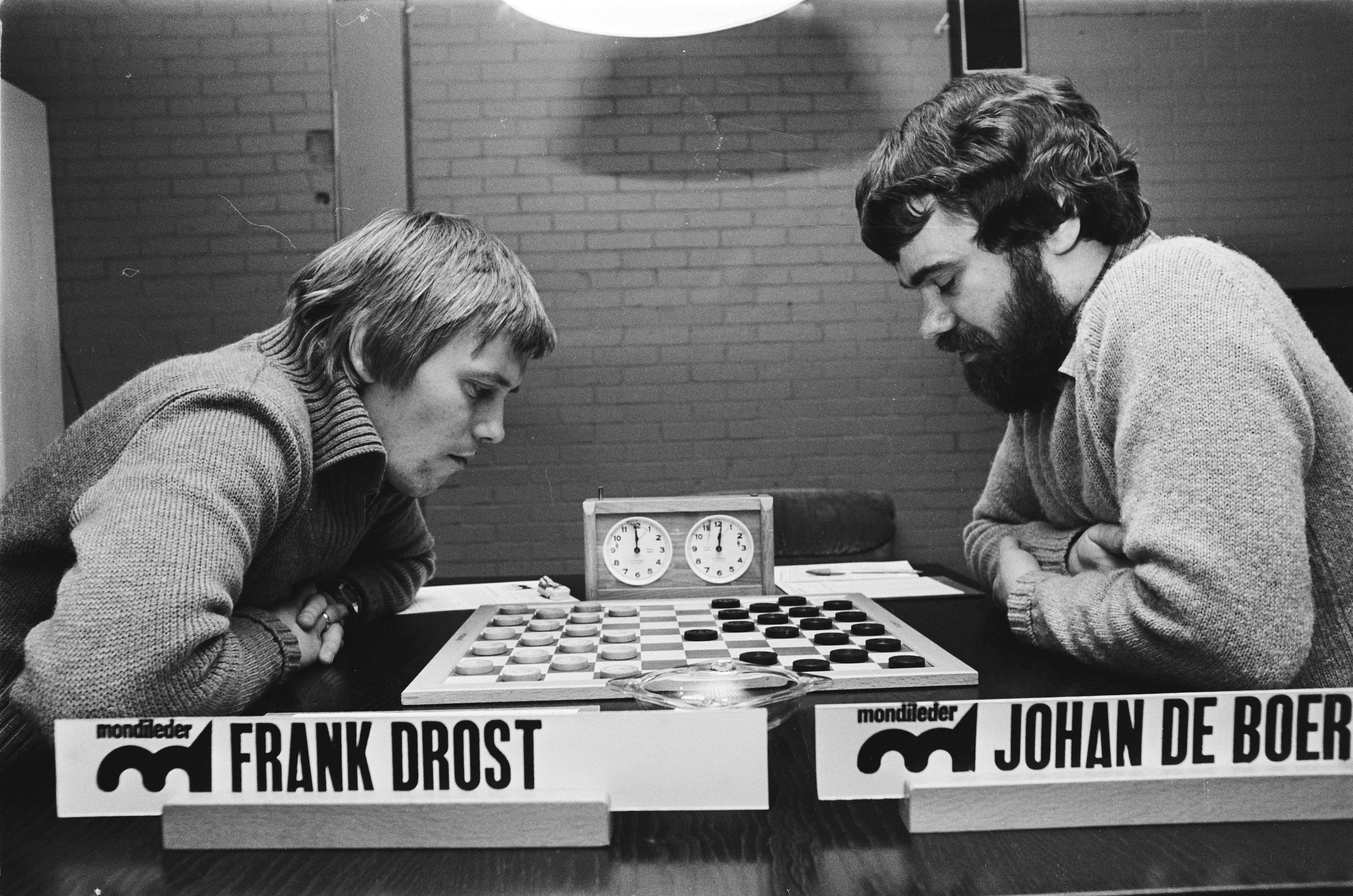 Nederlandse kampioenschappen dammen in Zevenaar; Frank Drost (l) tegen Johan de Boer